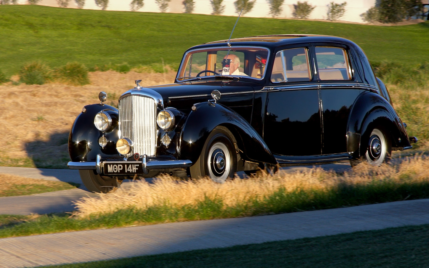 2011 Desert Classic, La Quinta, CA